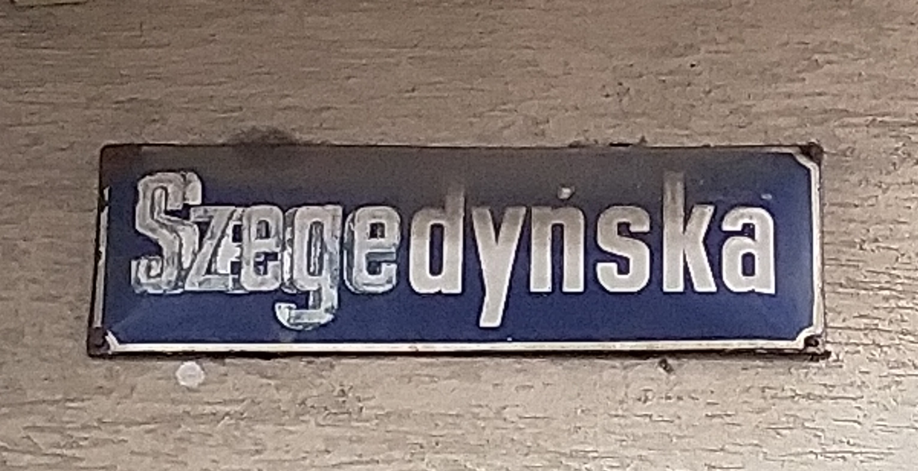 Tabliczka z nazwą ul. Segedyńskiej na bloku nr 8, później poprawionej na Szegedyńskiej